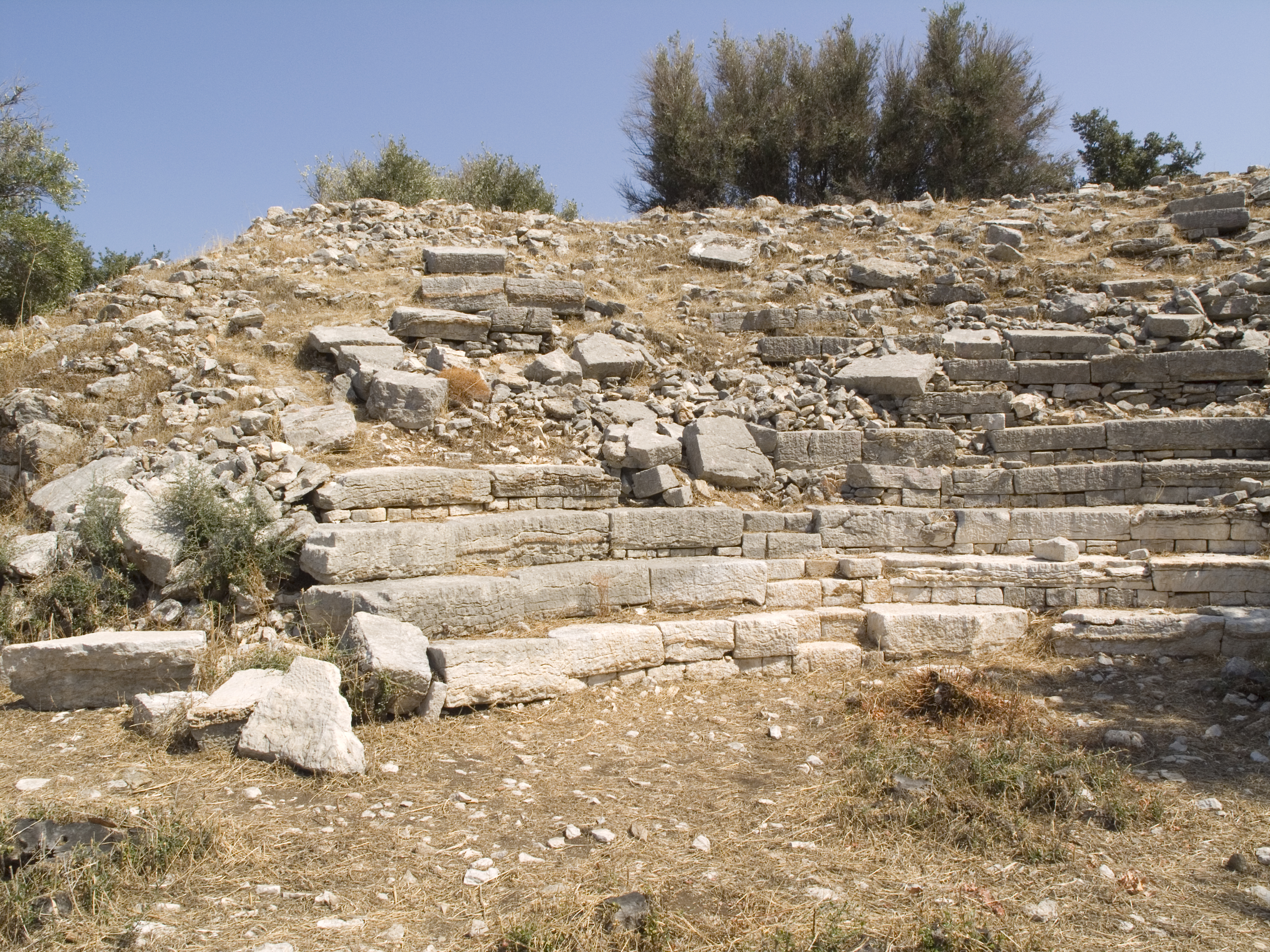 Турция – древний город Амос